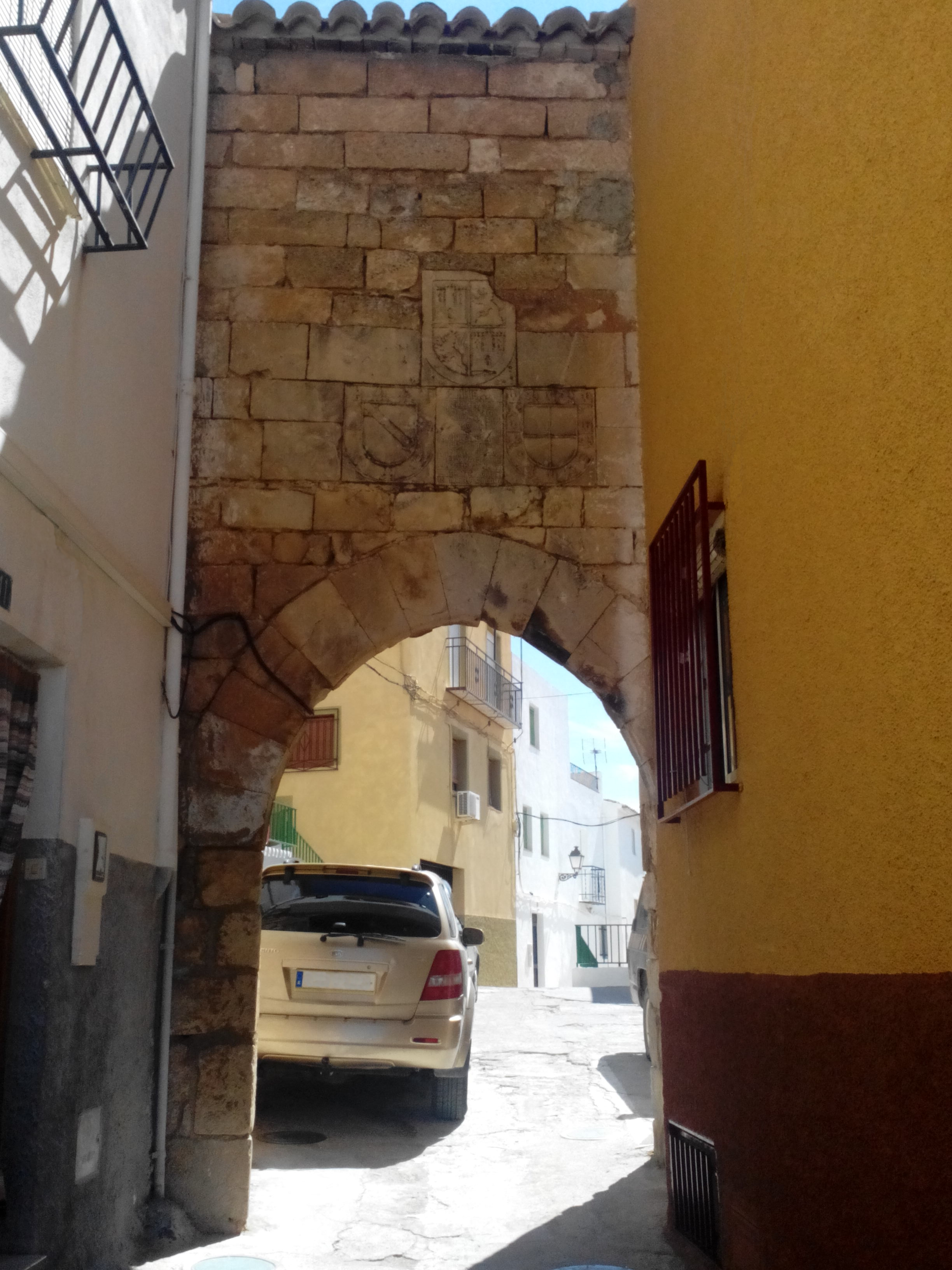 Fachada oeste del Arco de la Encarnación o Puerta de Jaén, Pegalajar (Jaén - España).